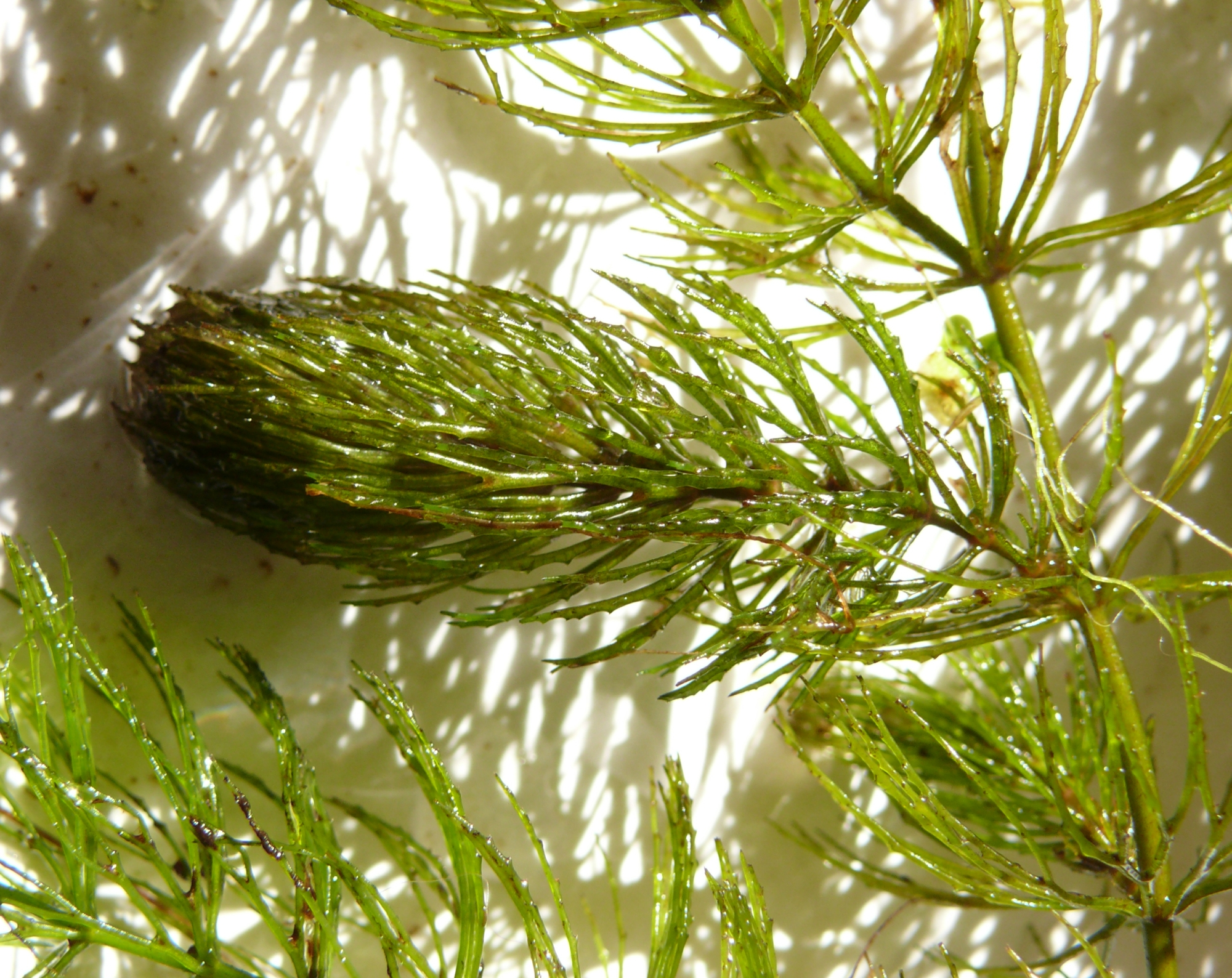 Ceratophyllum demersum, Schwäbisch-Fränkische Waldberge, Germany